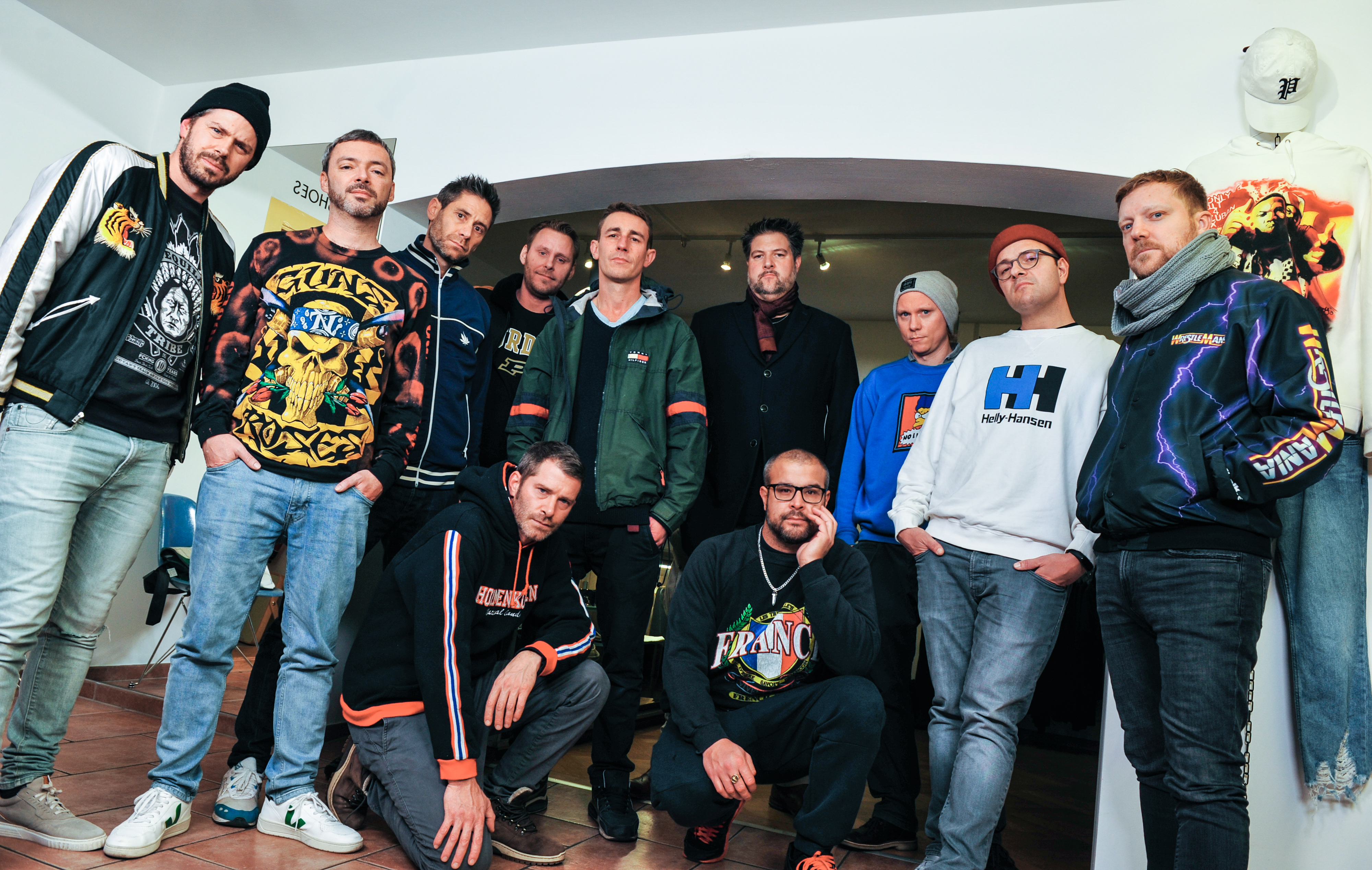 Chlyklass 2019, Pressefoto 3 by Peter Pfistner